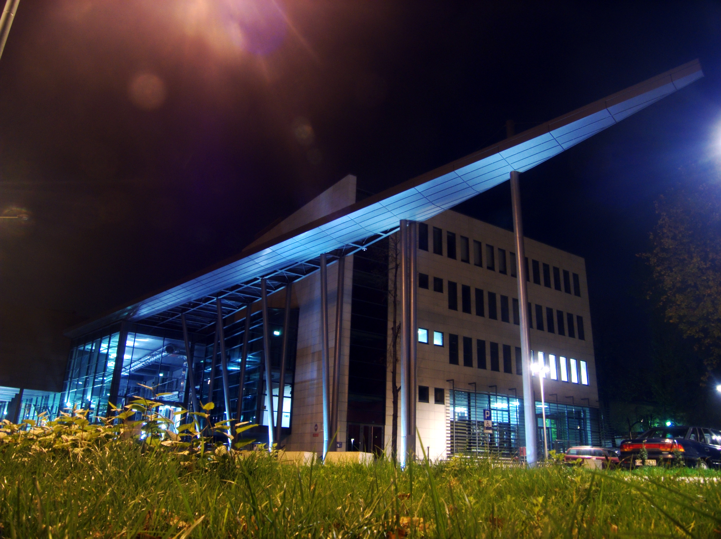 Wydział filologii UŚ Sosnowiec